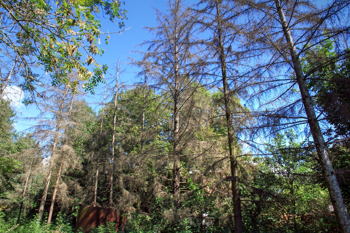 Столниченский парк, монумент природы, находится в Единецкий район, с. Столничень (код MD-ED-map-015)